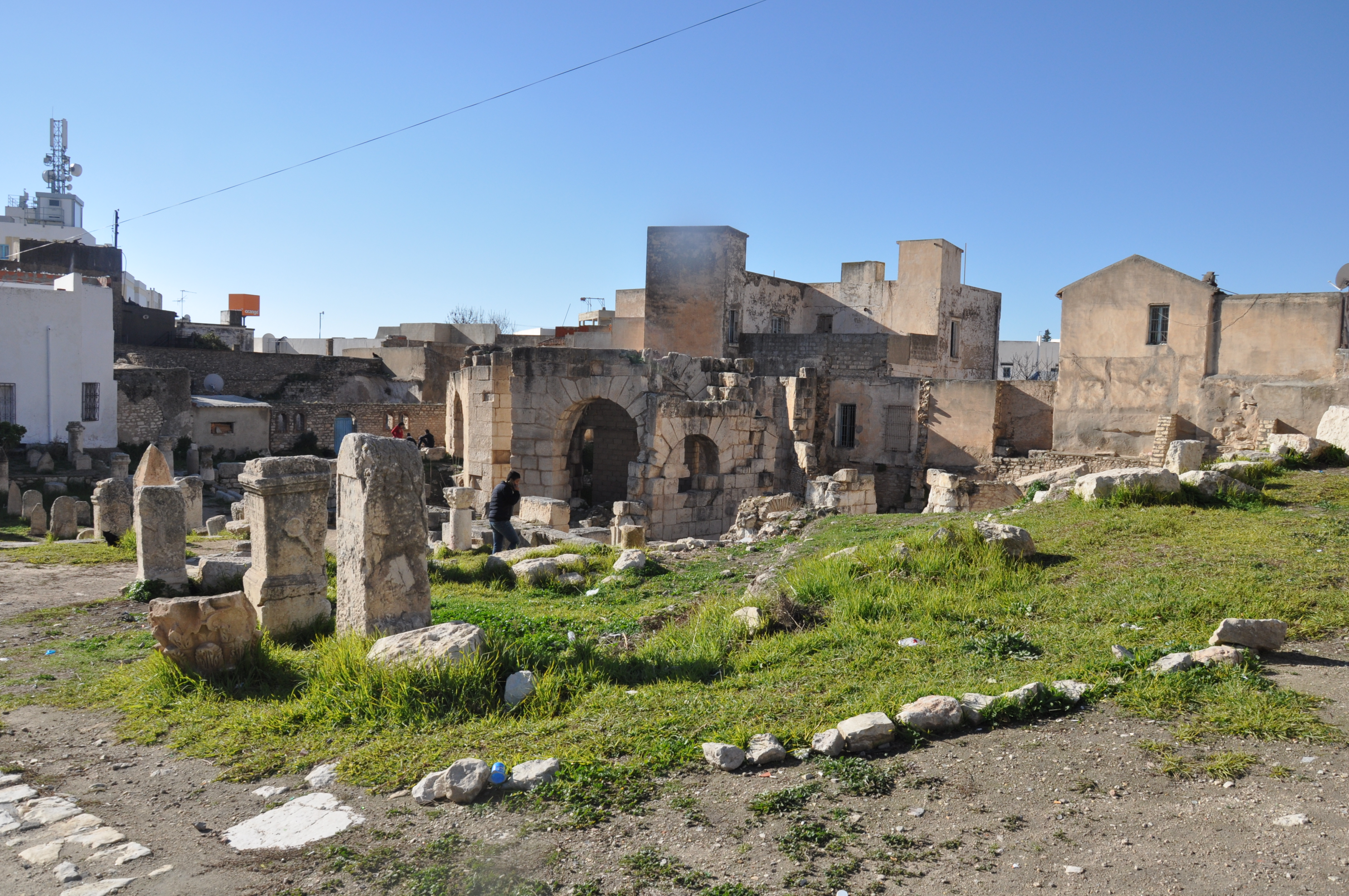 Thermes romains